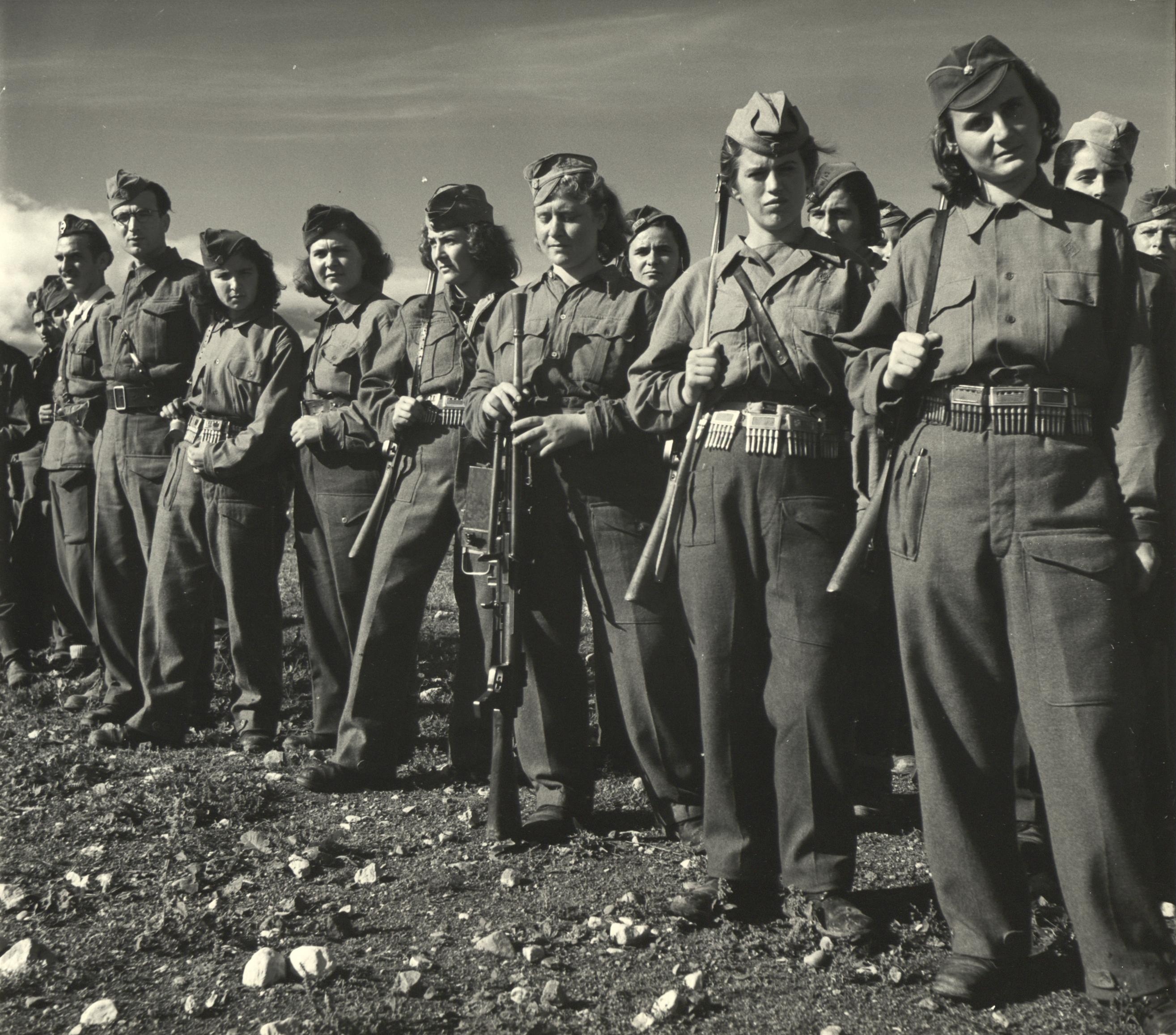 Εκδήλωση και έκθεση στο ΥΠΕΞ για τα 70 χρόνια από την κήρυξη πολέμου εναντίον της χώρας μας από τις δυνάμεις του άξονα Event and exhibition at the Foreign Ministry marking the 70th anniversary of the Axis powers’ declaration of war on Greece